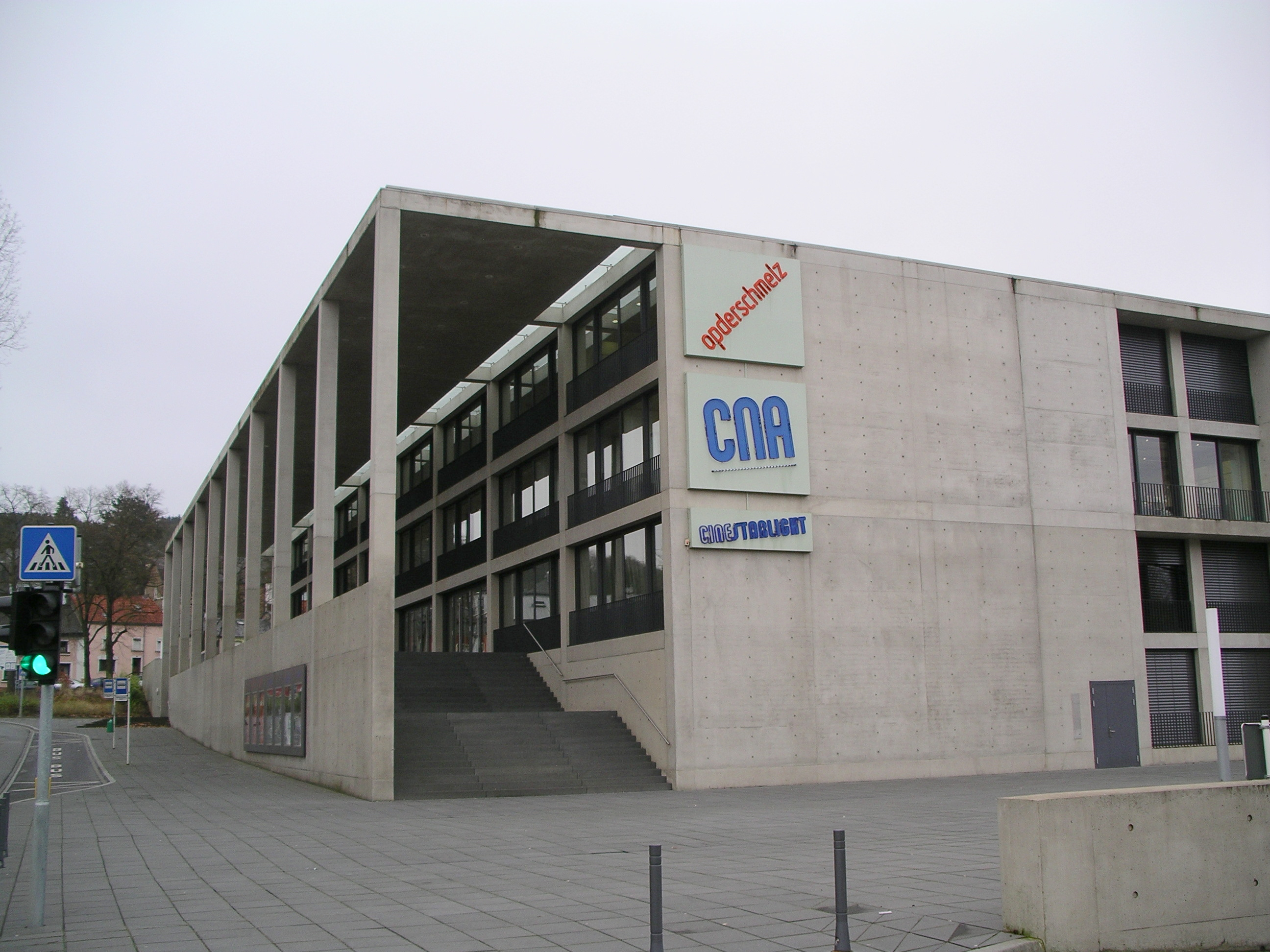 Centre national de l'audiovisuel, Dudelange